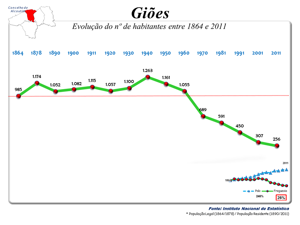 Censos 1864/2011